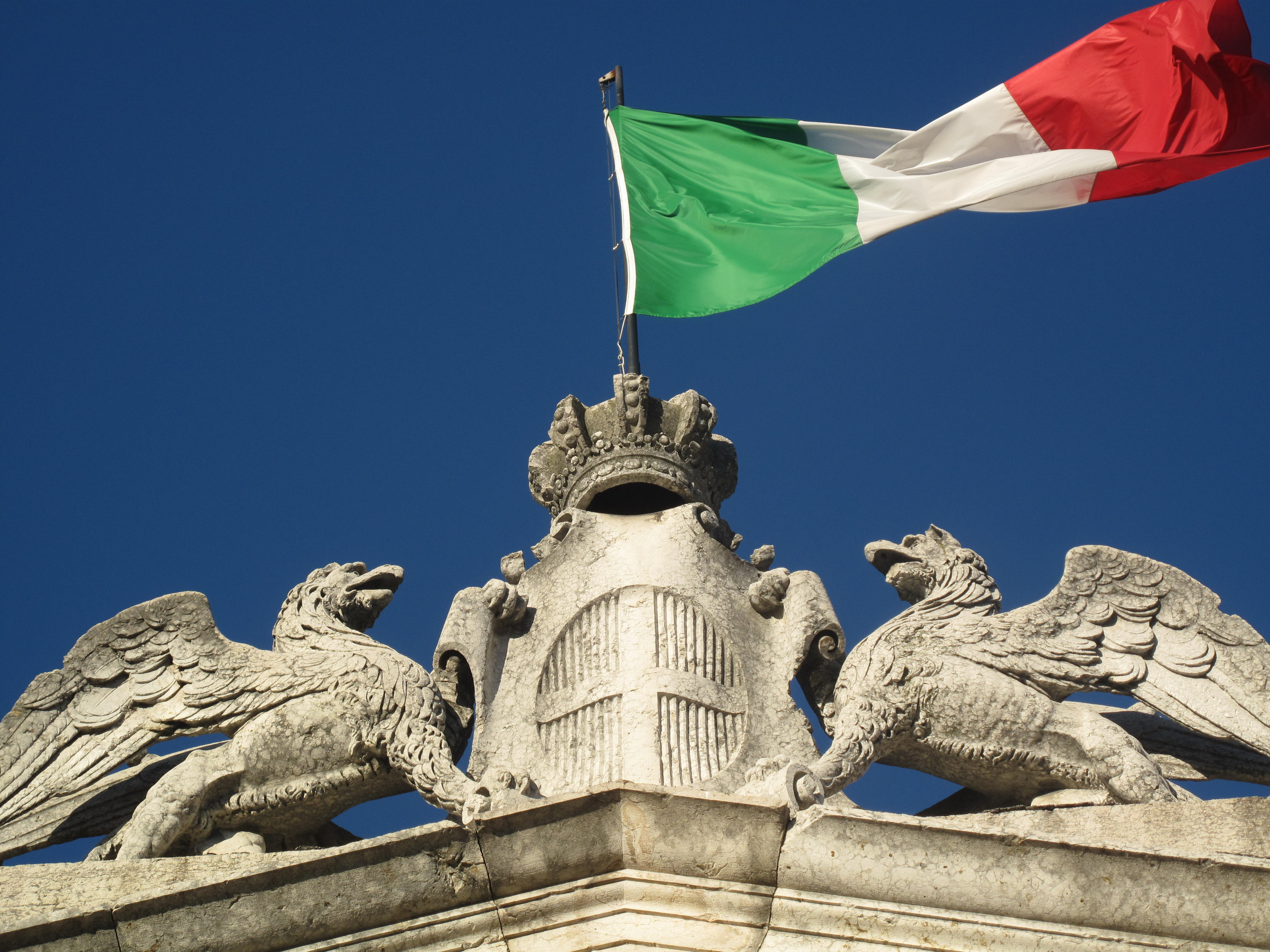 Dettaglio del gruppo scultoreo posto sopra l'entrata principale della facciata sud di Porta Nuova a Verona